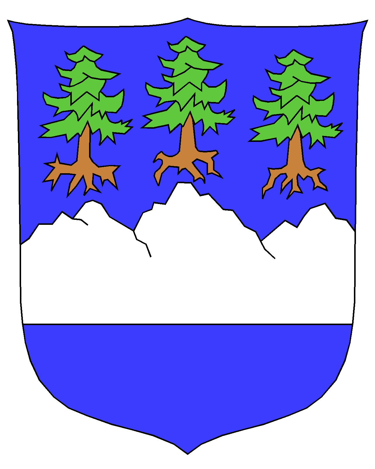 Das Wappen der Gemeinde Lax